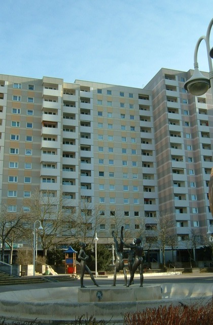 Schwalbach am Taunus, Brunnen von Willi Schmidt am Marktplatz in der Limesstadt